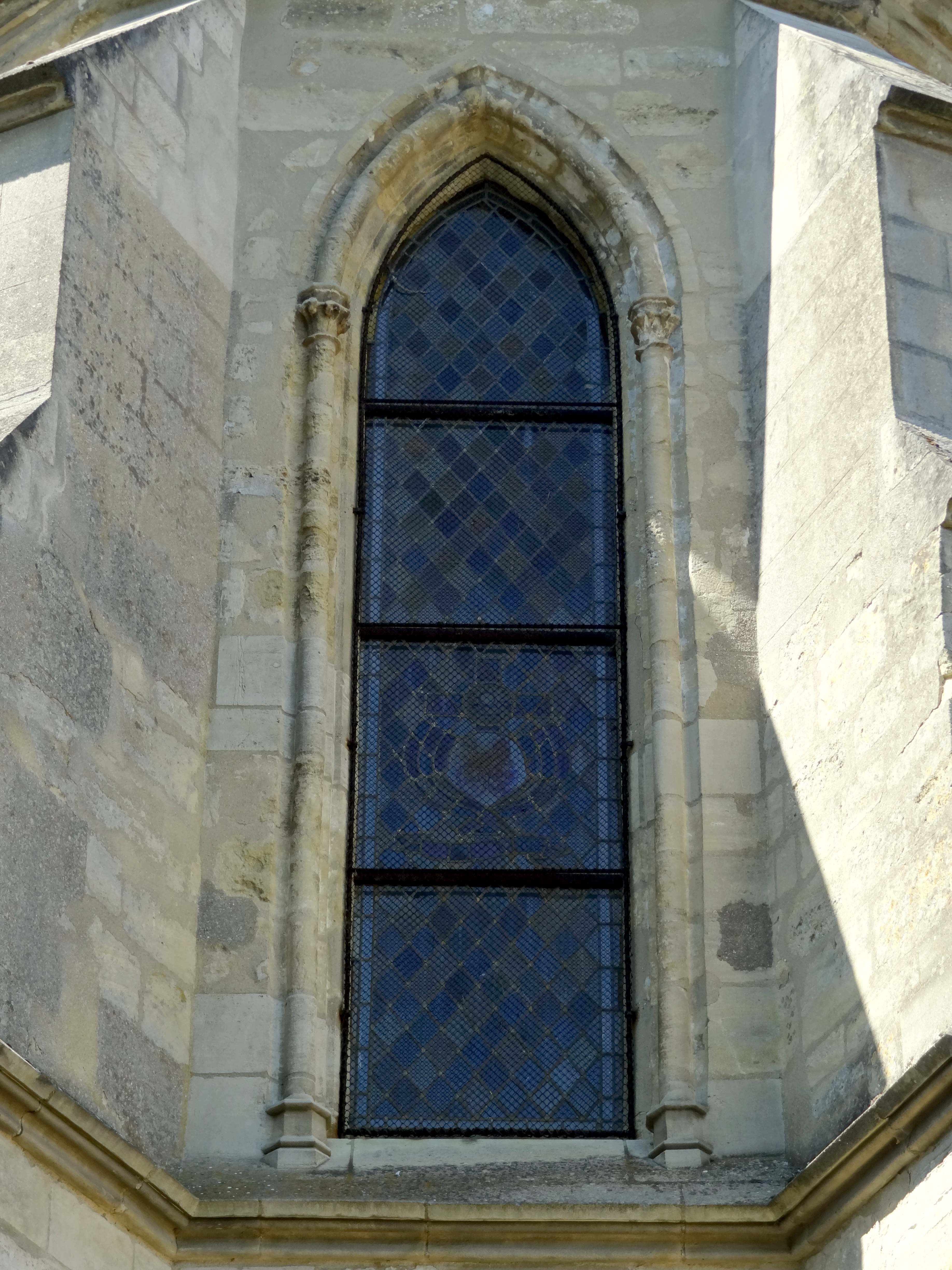 Église Notre-Dame-de-l'Assomption d'Évecquemont - voir titre.